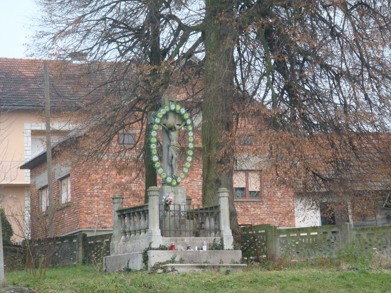 Krkač - Raspelo s Isusekom